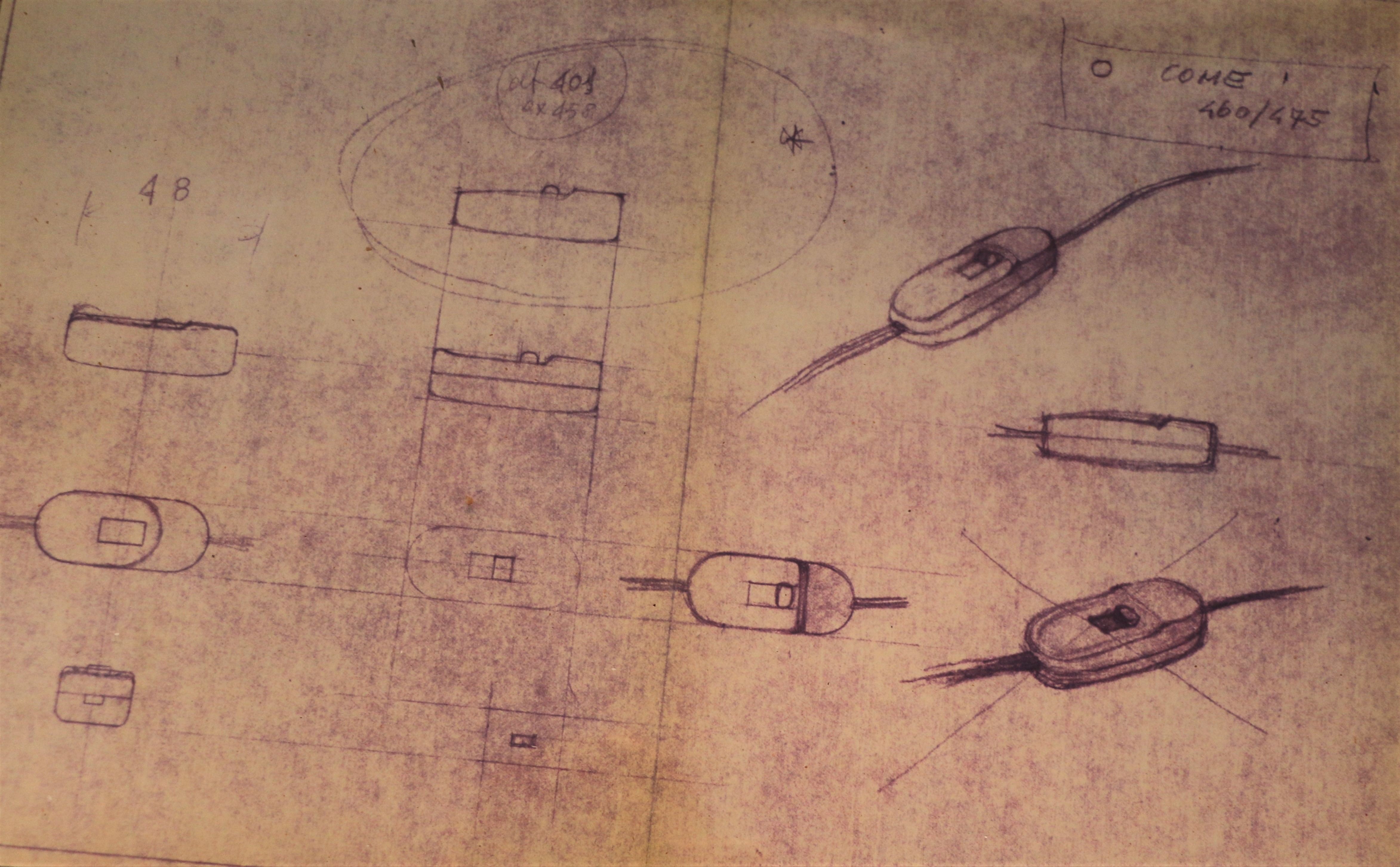 foto personale degli schizzi originali di Achille Castiglioni per l'Interruttore rompitratta